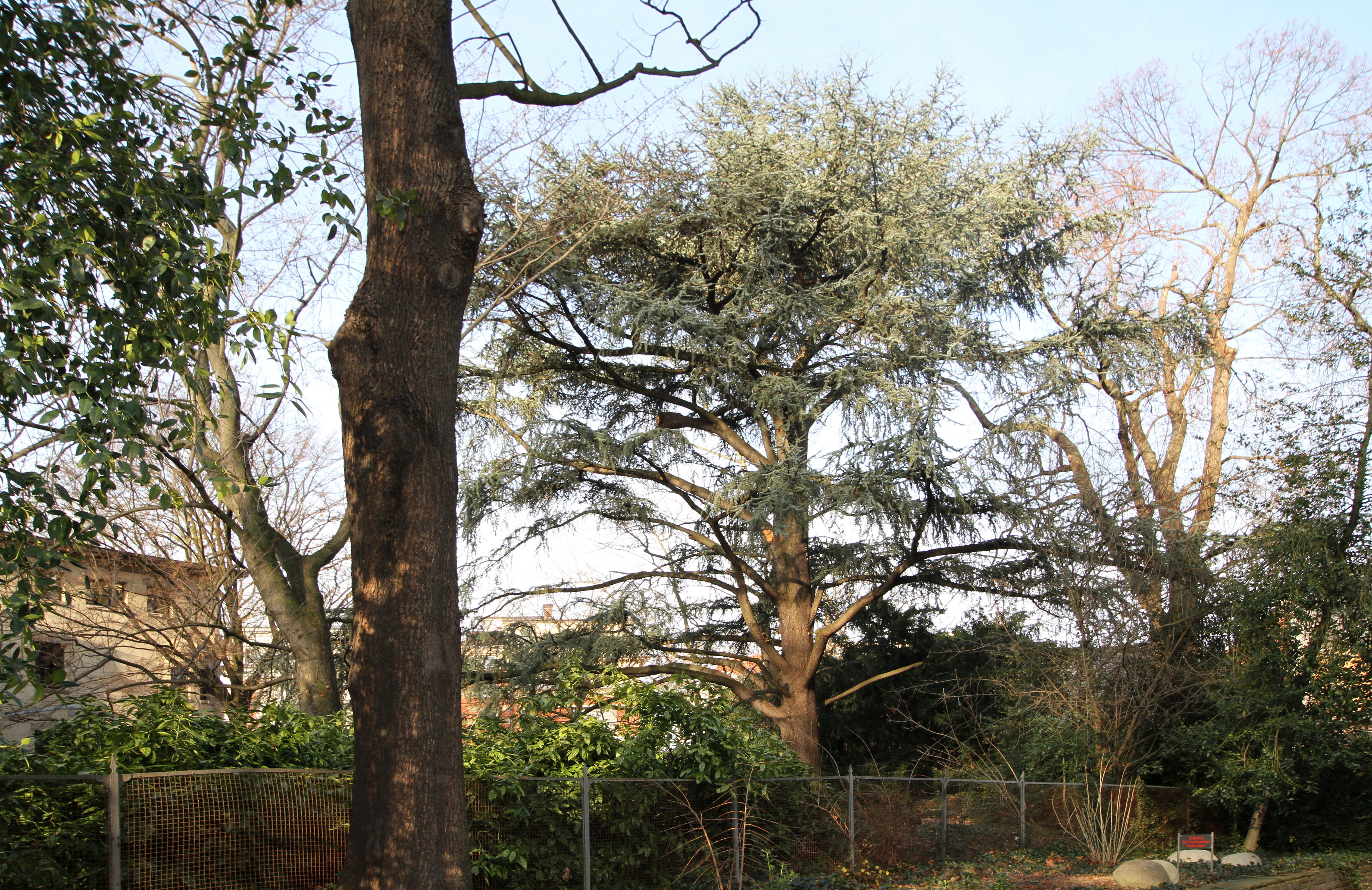 Köln Neustadt-Nord, Theodor-Heuss-Ring 9l